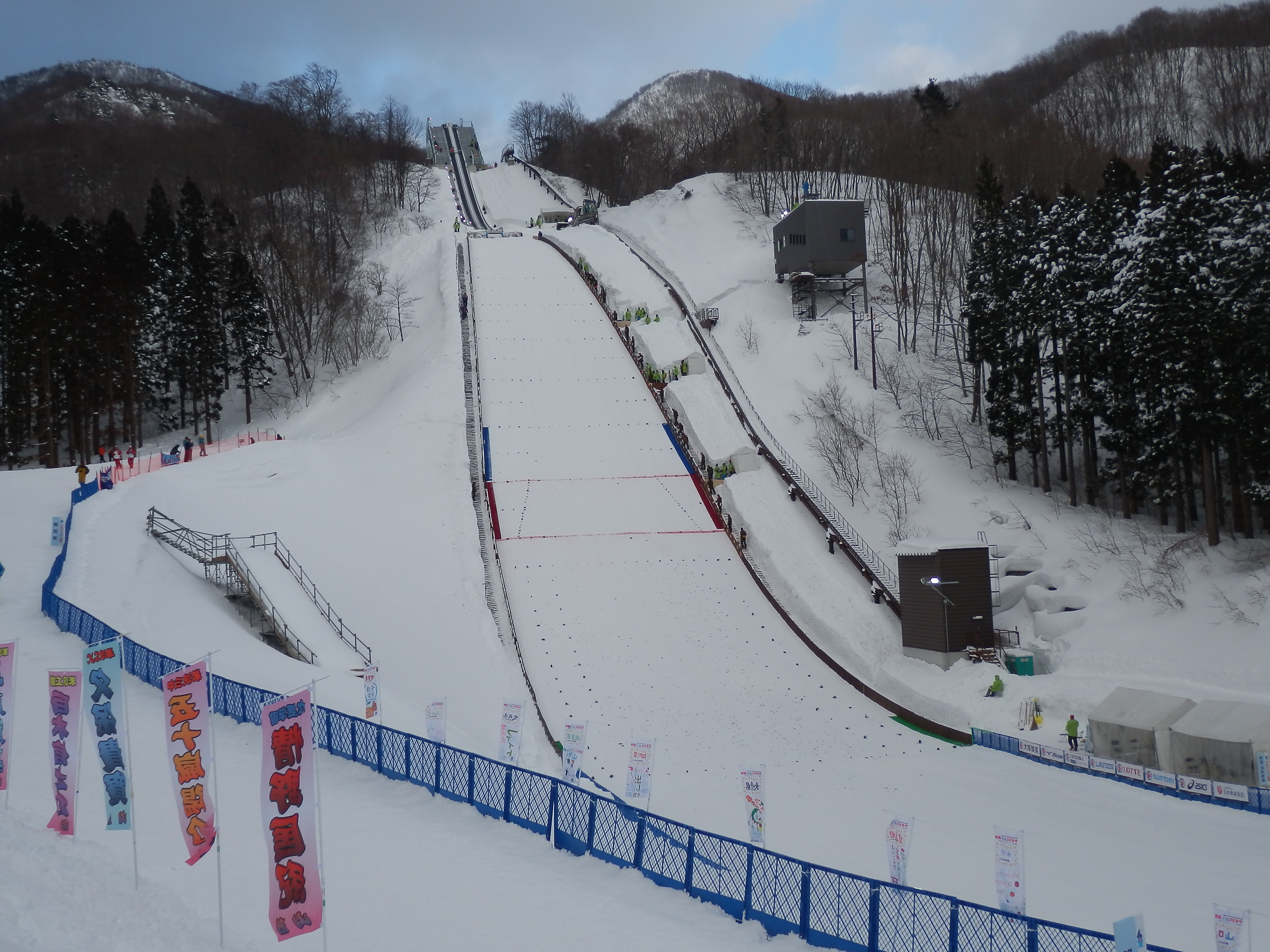 山形蔵王シャンツェ